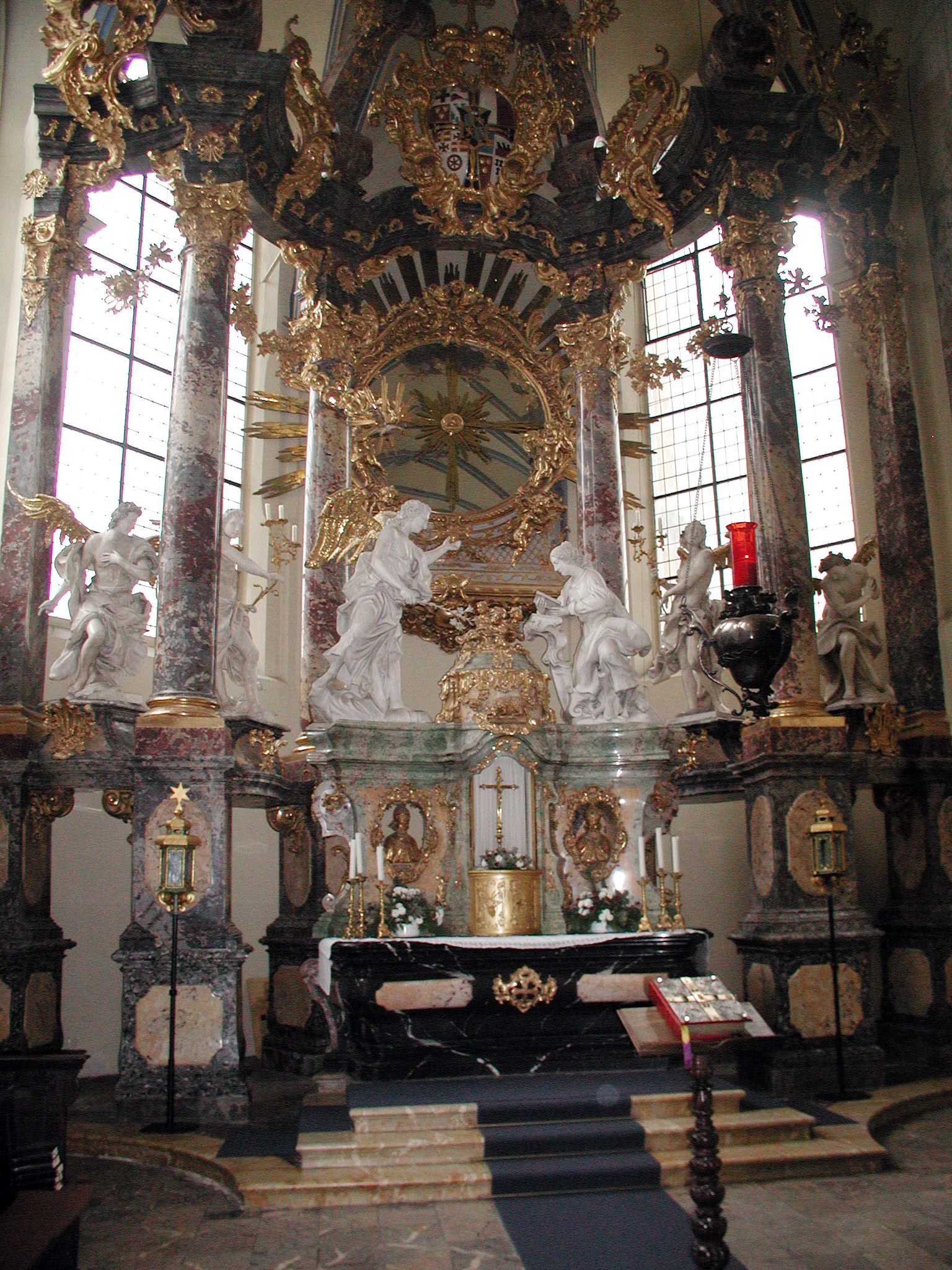 Brühl, Schlosskirche